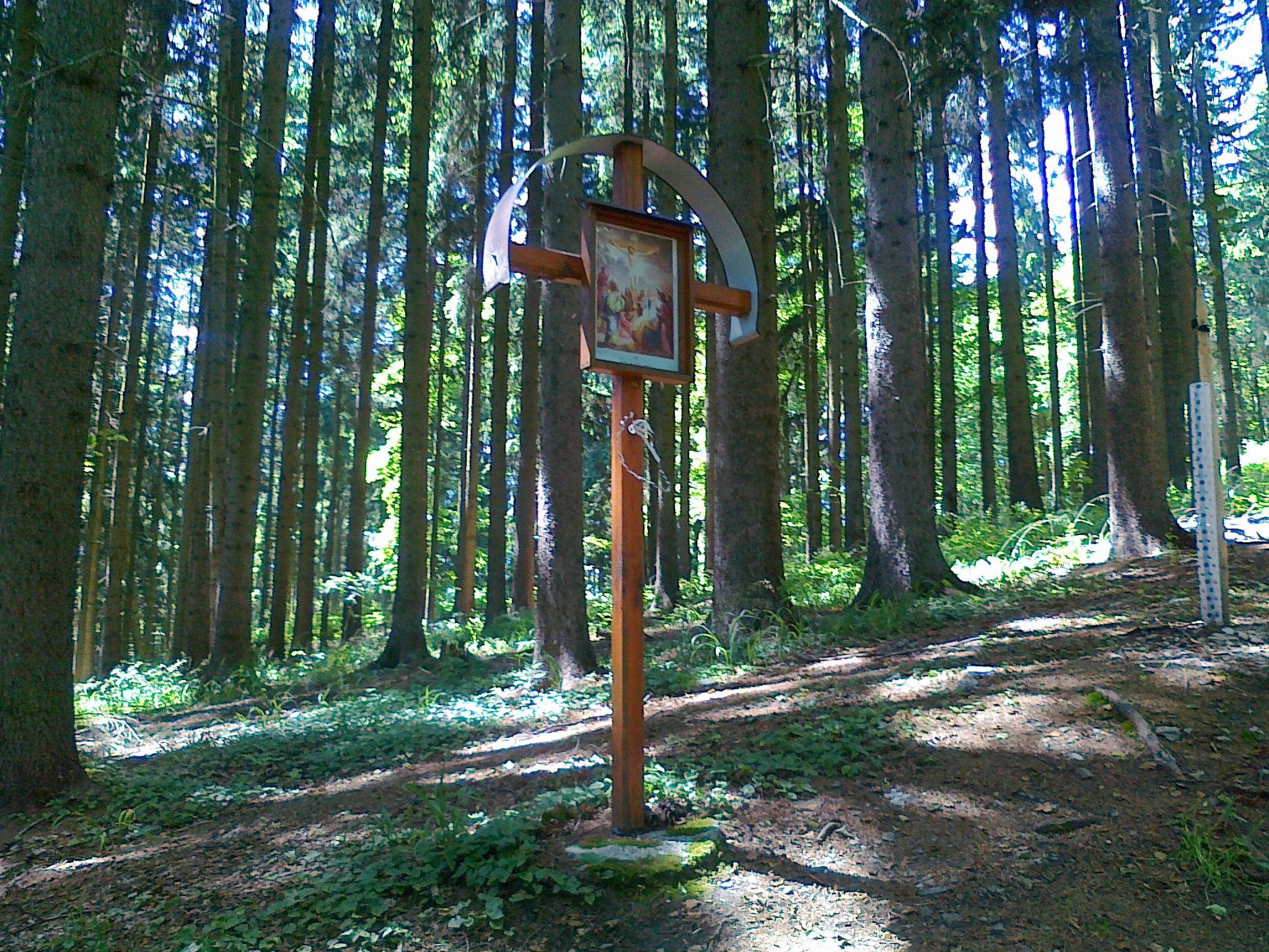 XII stacja Drogi krzyżowej na górze Anenský vrch